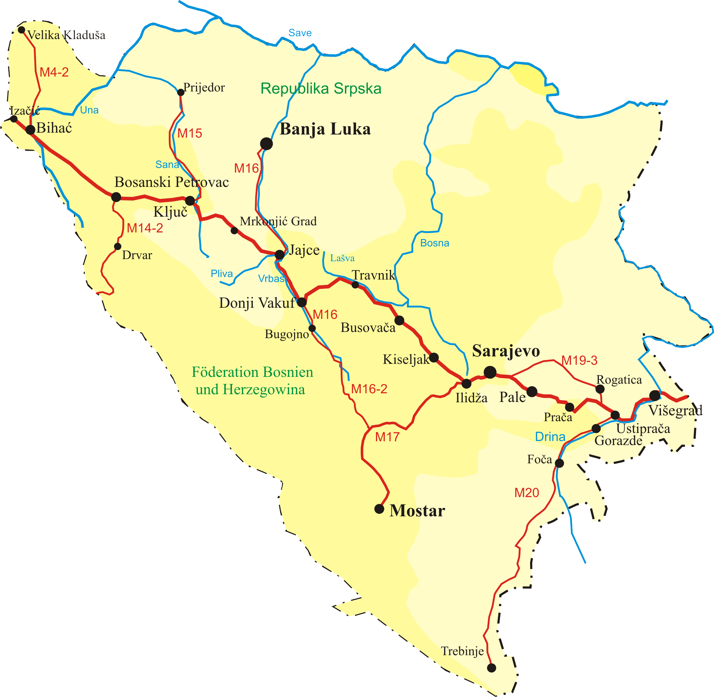 Magistralstraße 5 (Magistralna cesta 5, kurz M5) in Bosnien und Herzegowina